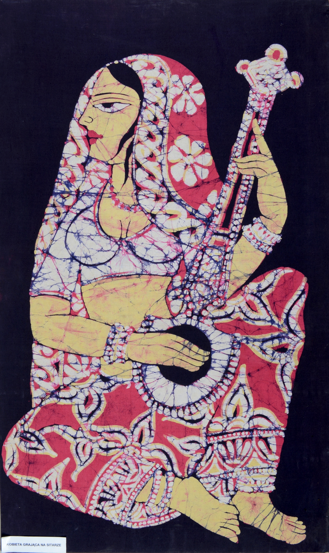 Obraz wykonany na płótnie bawełnianym techniką batiku, przedstawiający kobietę grającą na sitarze. Kobieta ubrana jest w spódnicę ghagra i bluzkę ćoli. Lewą ręką trzyma szyjkę sitaru, którego pudło spoczywa między nogami.